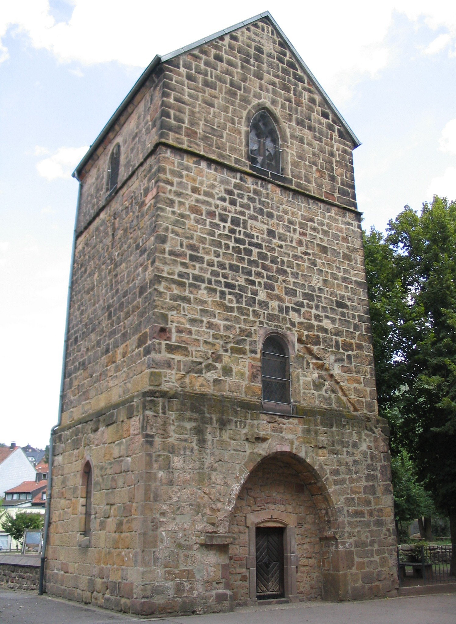 Beschreibung: Der Alte Turm in Dudweiler (Saarbrücken/Deutschland). Das älteste Gebäude des Ortes. Photographer: kh80 Date: 2005-07-28 License: GFDL and cc-by-sa/2.0/de